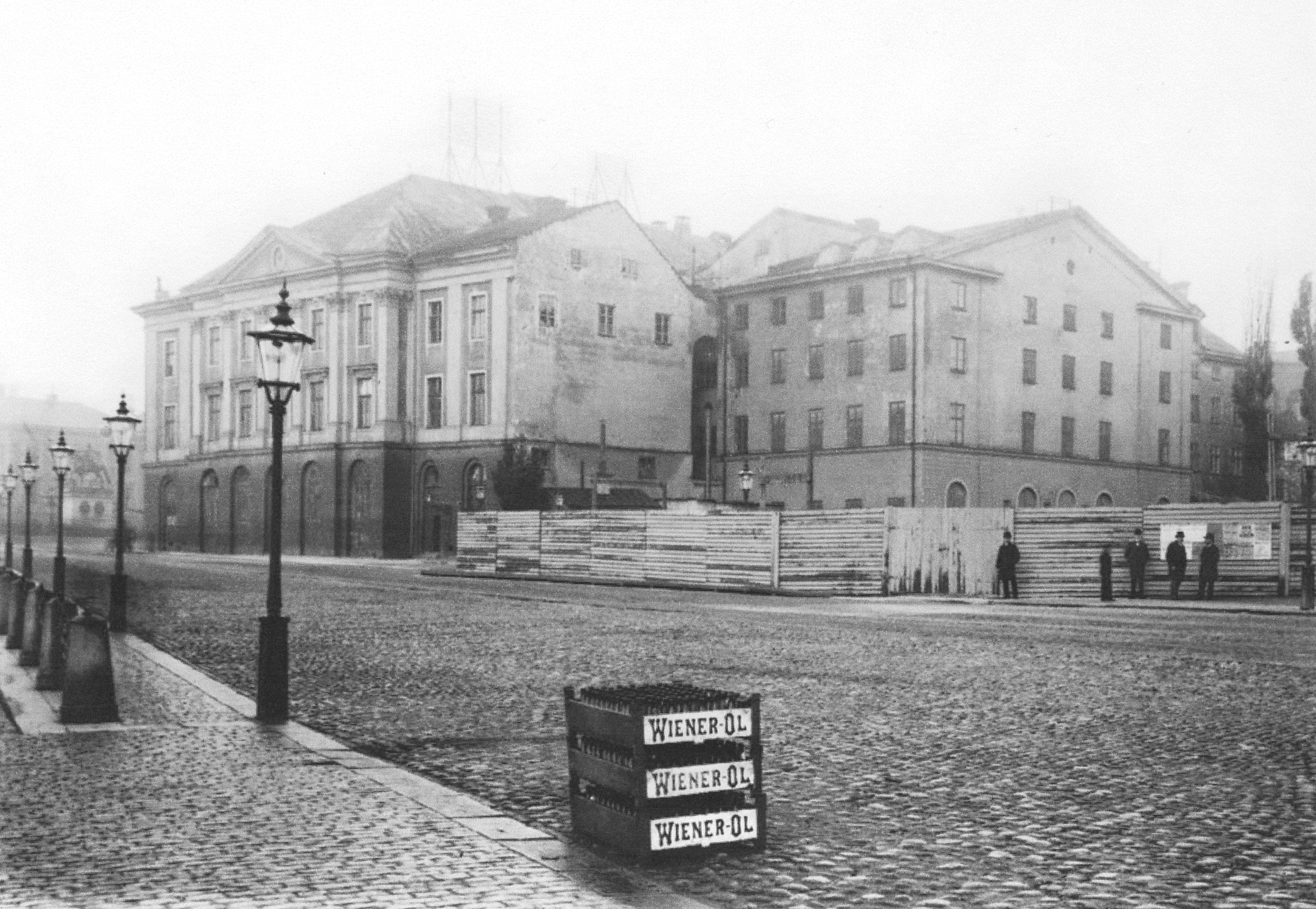 Gustavianska operan i Stockholm, fasad mot öst